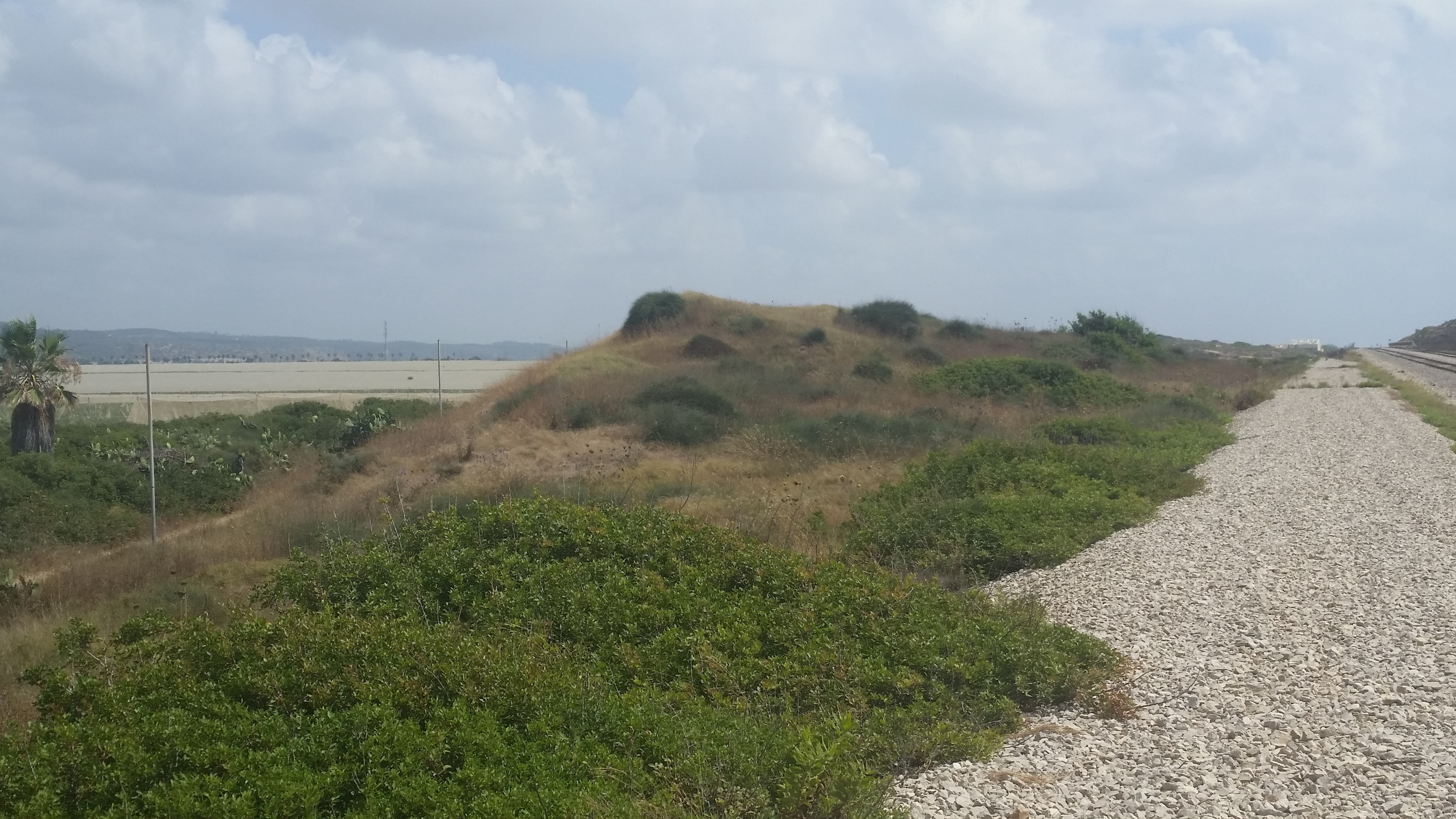 תל סחר אתר ארכאולוגי ידוע גם בשם תל מגדים. שוכן ליד מושב מגדים בחוף הכרמל